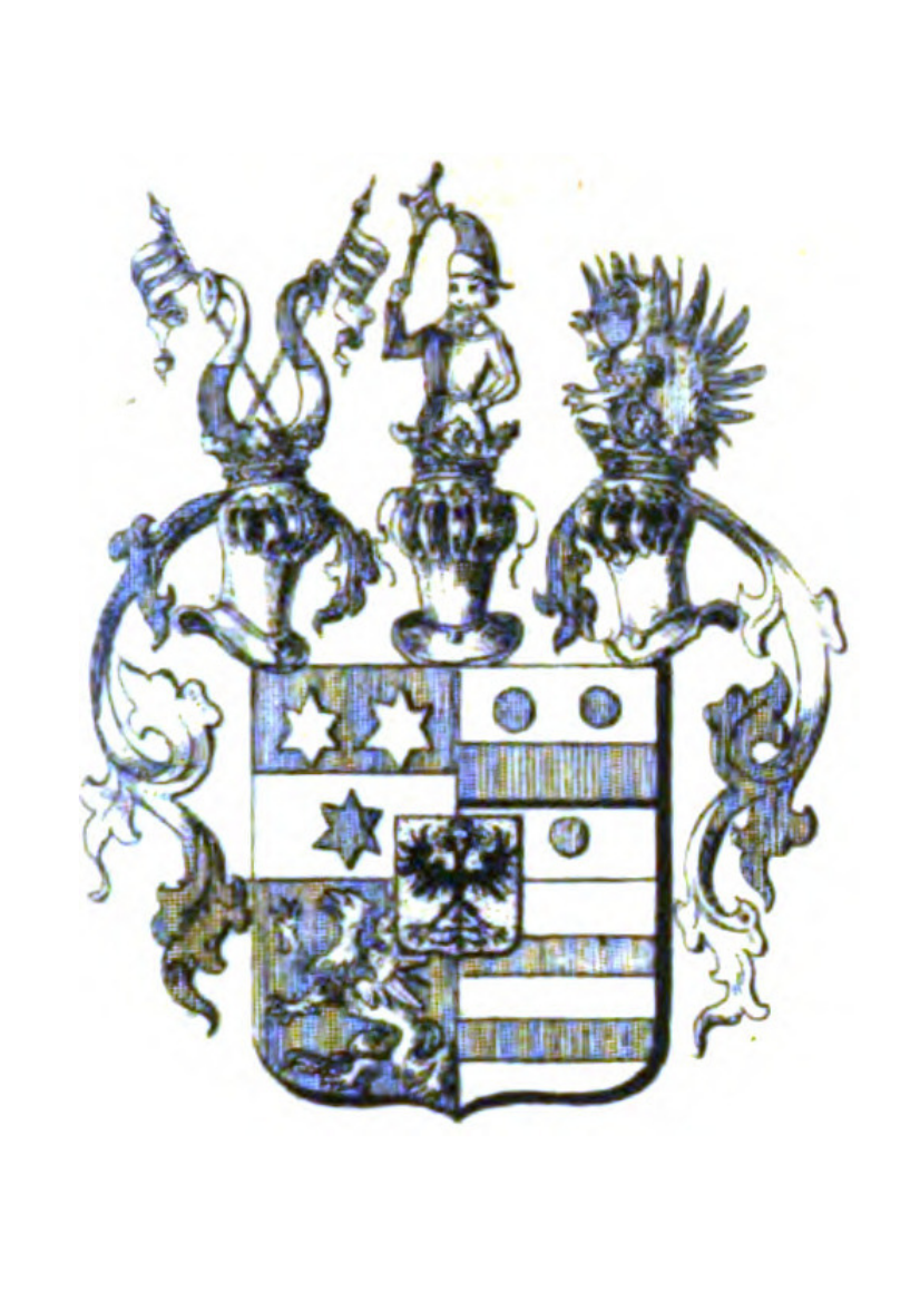 Blazono de la grafoj de Erbach-Wartenberg-Roth" el Otto Titan von Hefner (ed.): "Grosses und allgemeines Wappenbuch", 2-a volumo, Nurembergo 1854, tabulo 4.